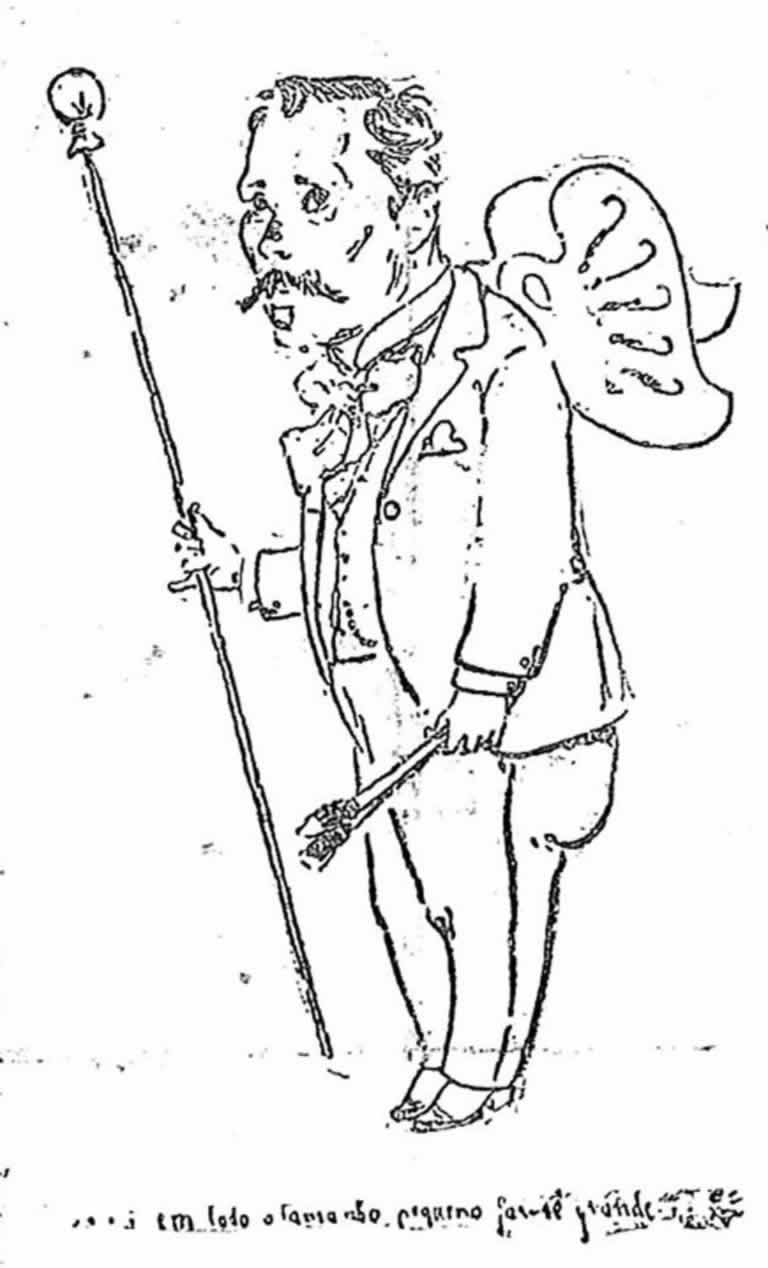 Caricatura de Pedro Weingärtner